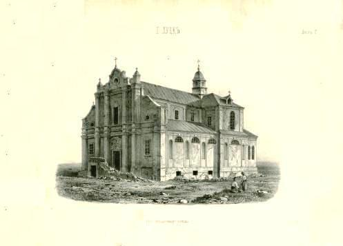 Луцьк. Бернардинський костел до перебудови